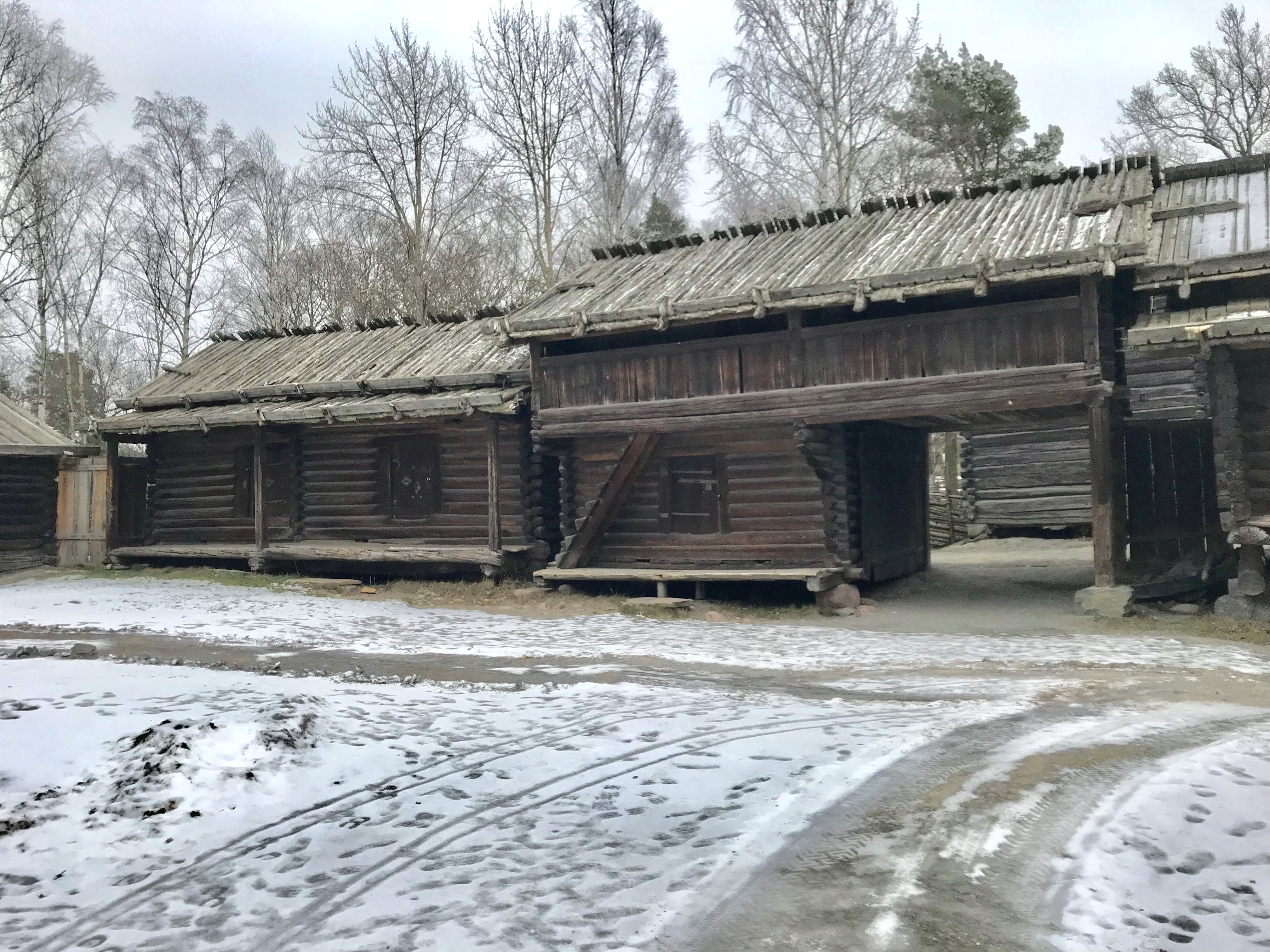 Skansen 2019